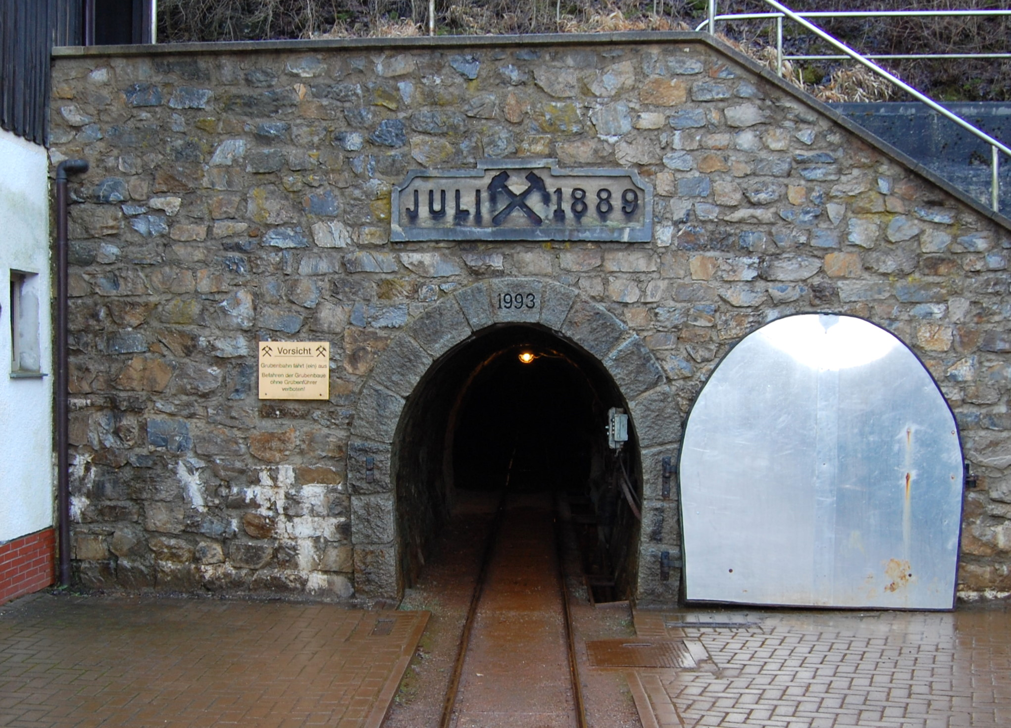 Mundloch des Oberen Mühlentalstollens; Einfahrt zum Besucherbergwerk Drei Kronen und Ehrt. Elbingerode, Sachsen-Anhalt, Deutschland.